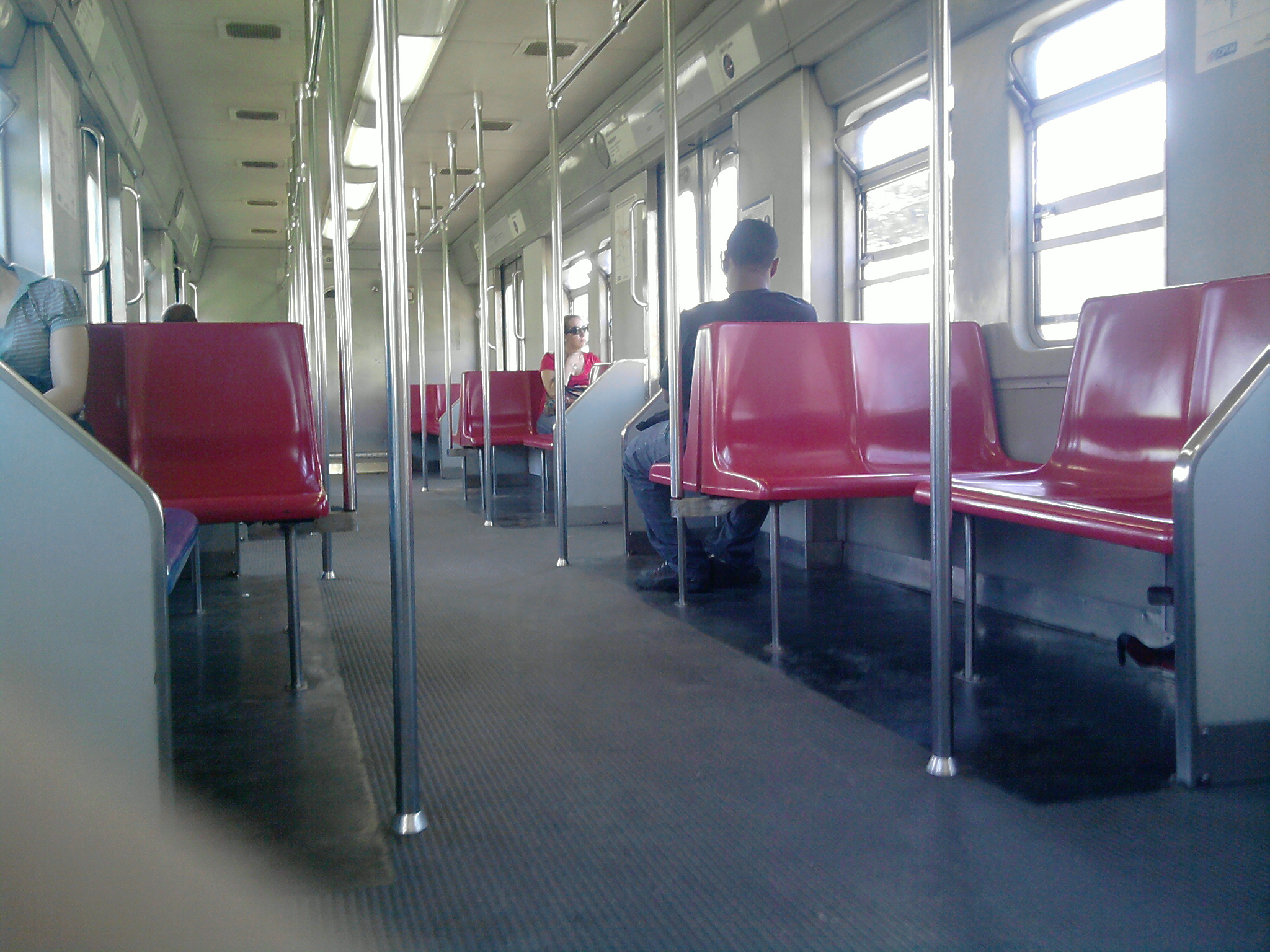 Interior de Trem da Série 5000 (Fepasa), revitalizado pela CPTM entre 1999 e 2000.